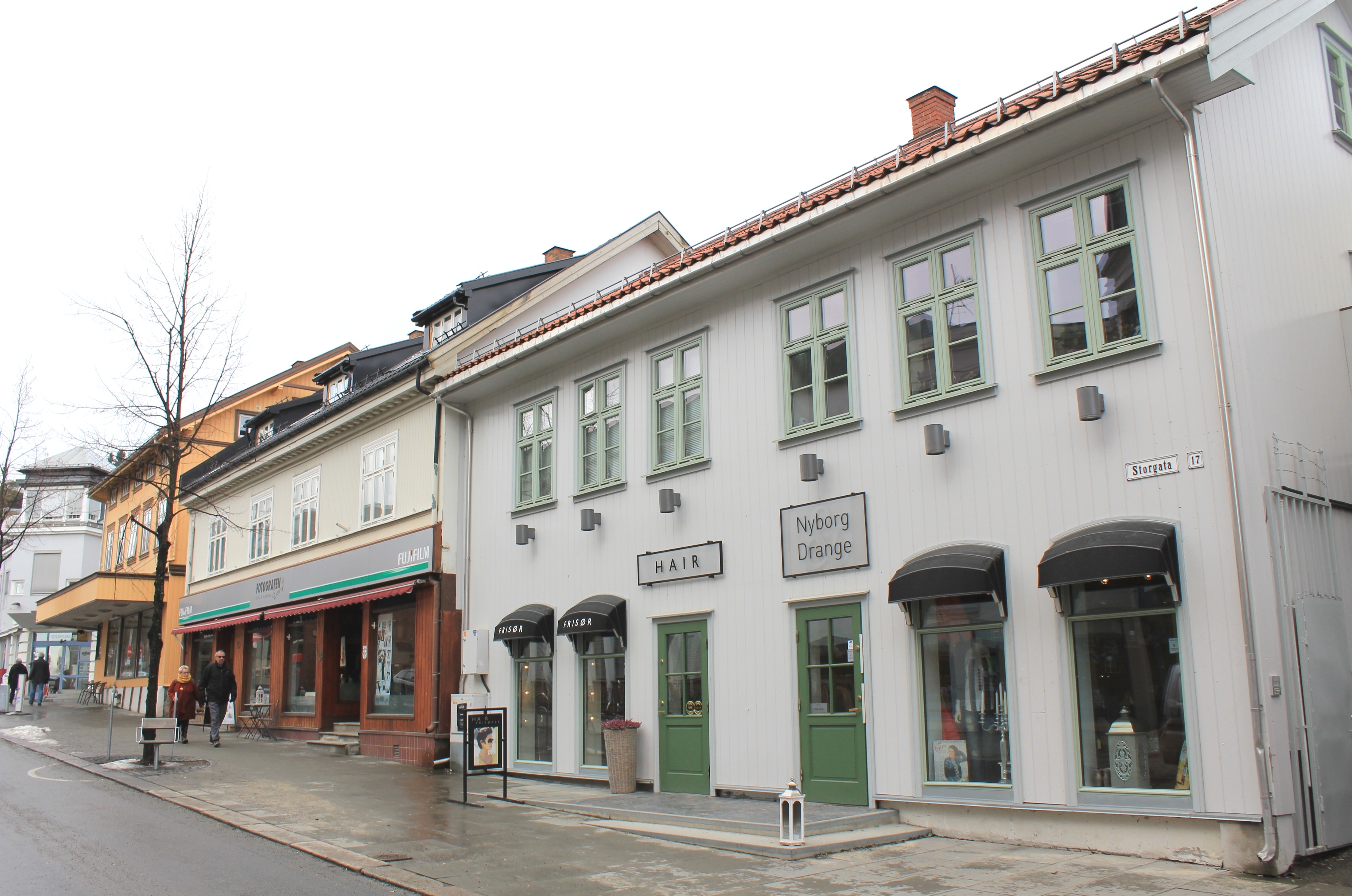 Storgata 17 på Gjøvik med Boddinggården.